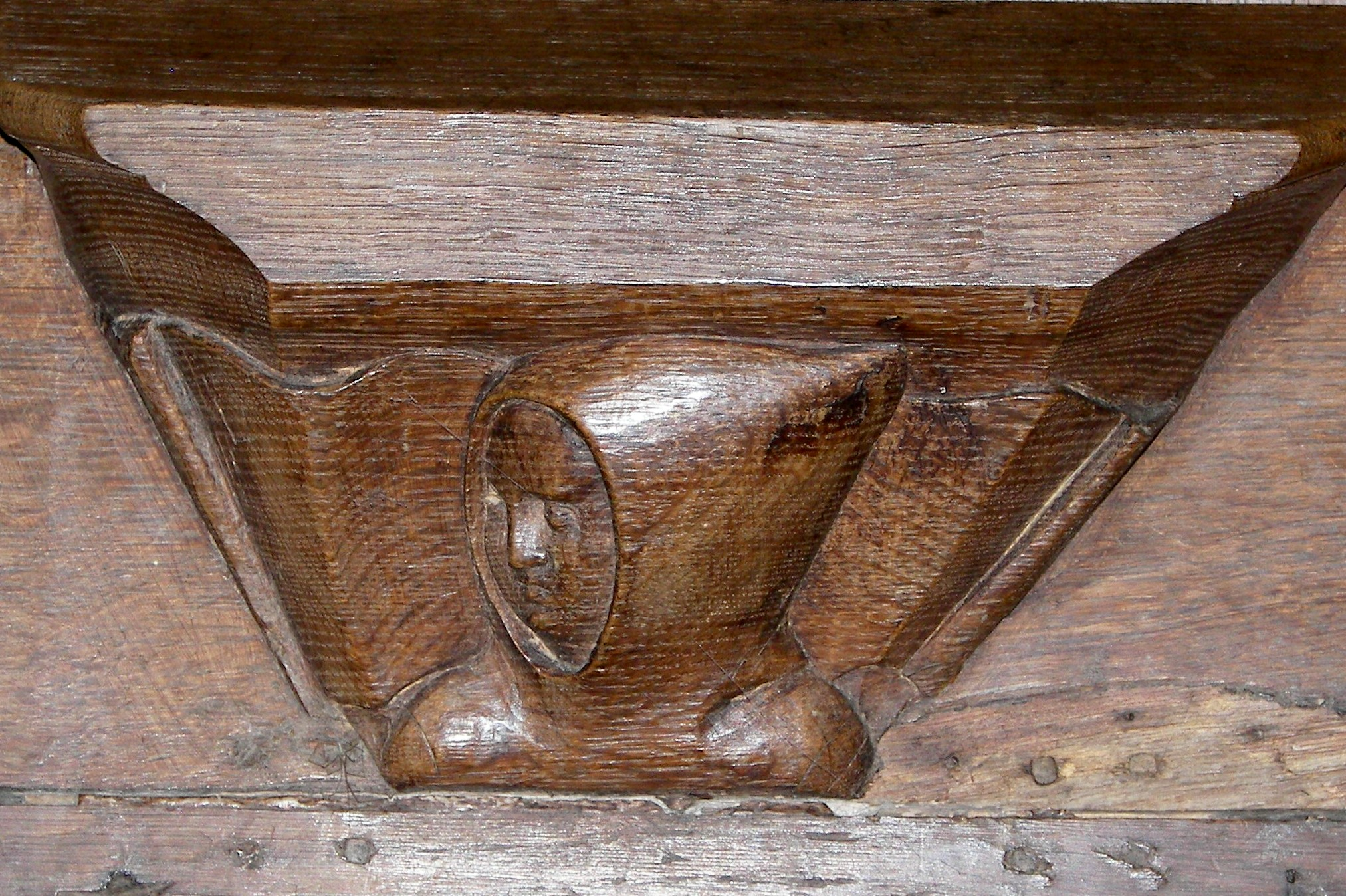 Miséricorde de l'église Ste Marie de Pont Sainte Marie (10) France